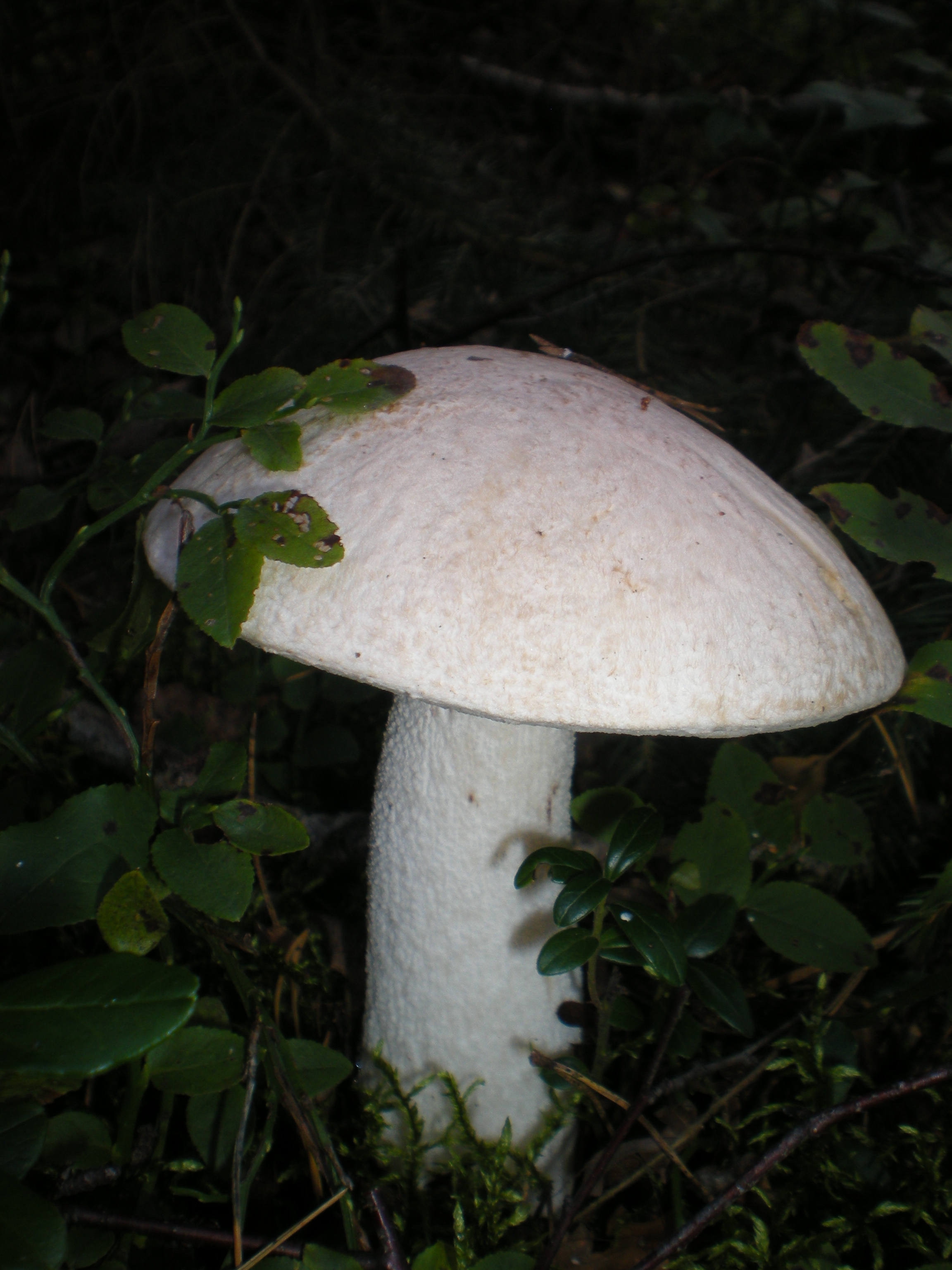 Weißer Birkenpilz (Leccinum percandidum)